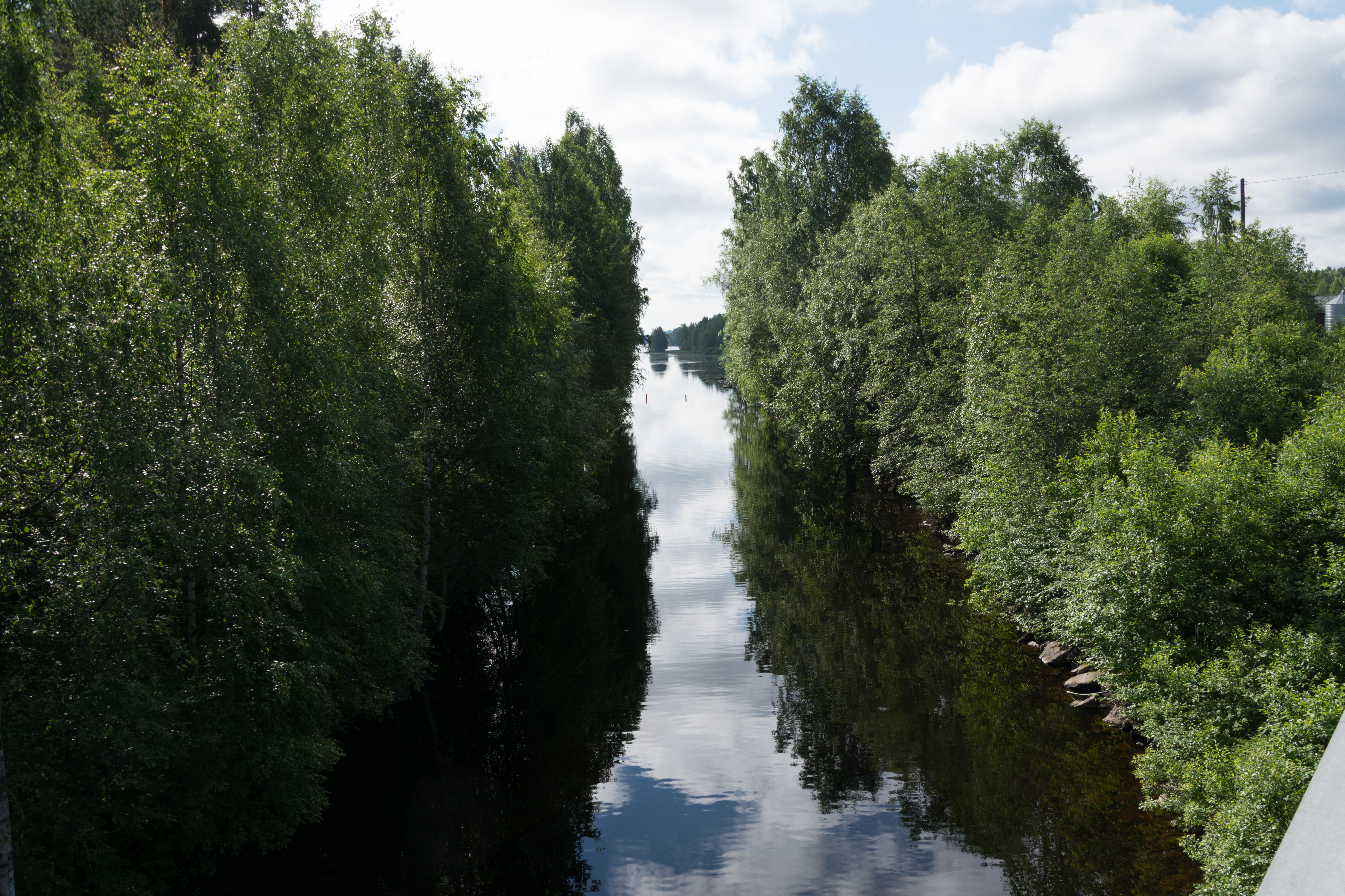 Kuttakosken kanava Kuopion Karttulassa